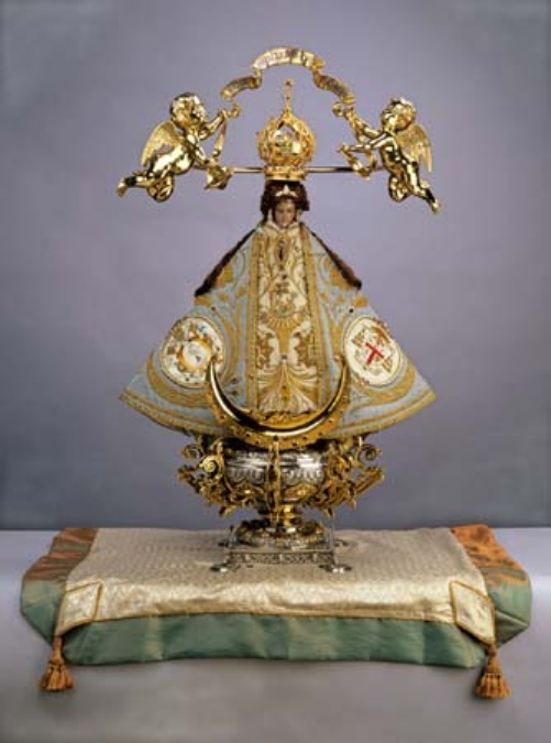 Imagen de la Virgen de San juan de los Lagos, Jalisco, Mexico